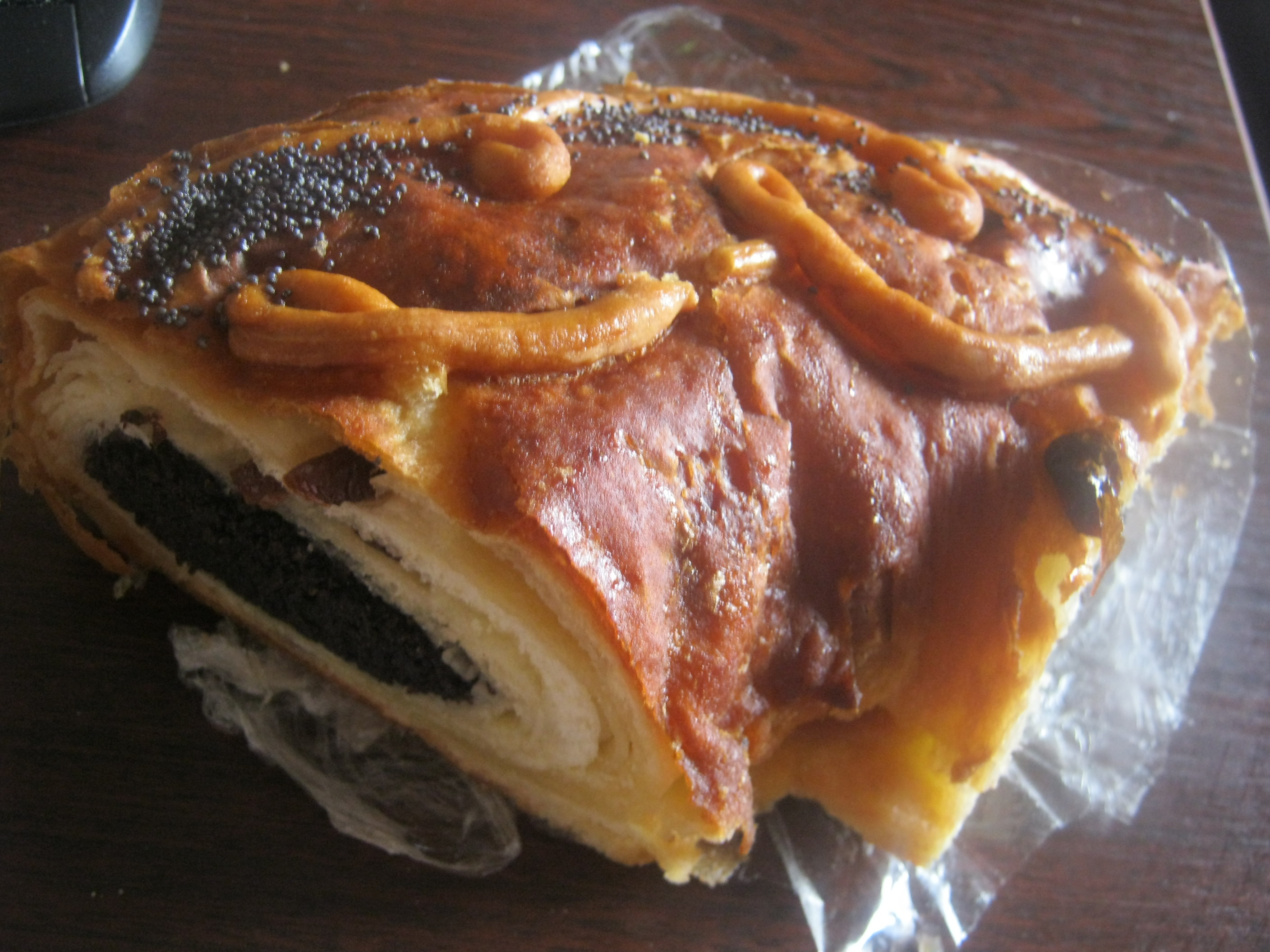 Šimtalapis